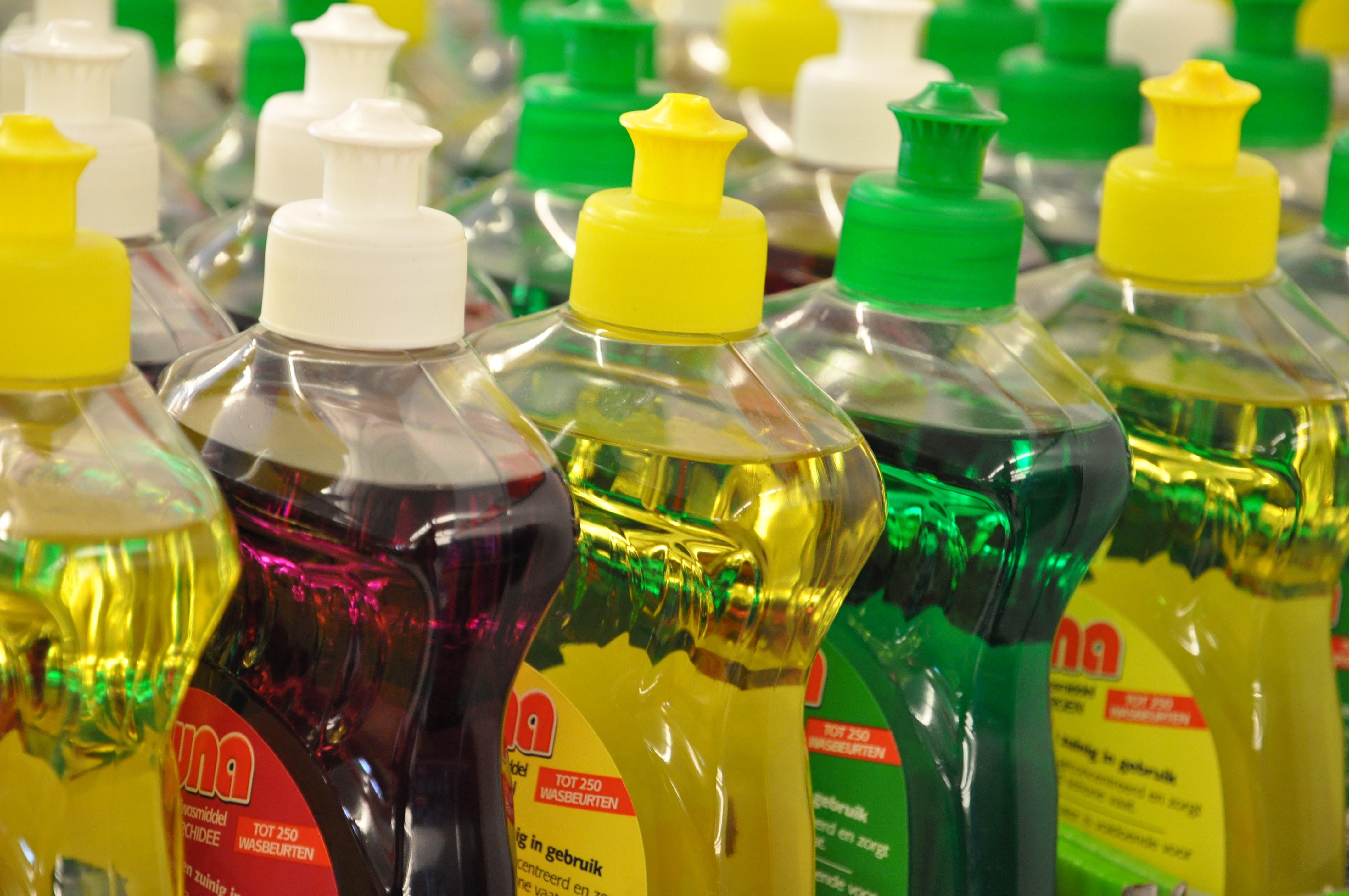 Flessen afwasmiddel van het eigen merk Una van Aldi.